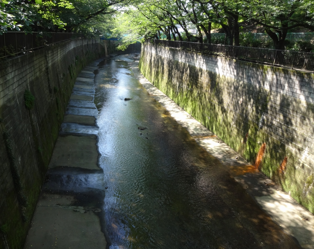 石神井川 (Shakujii River, Tokyo, Japan)